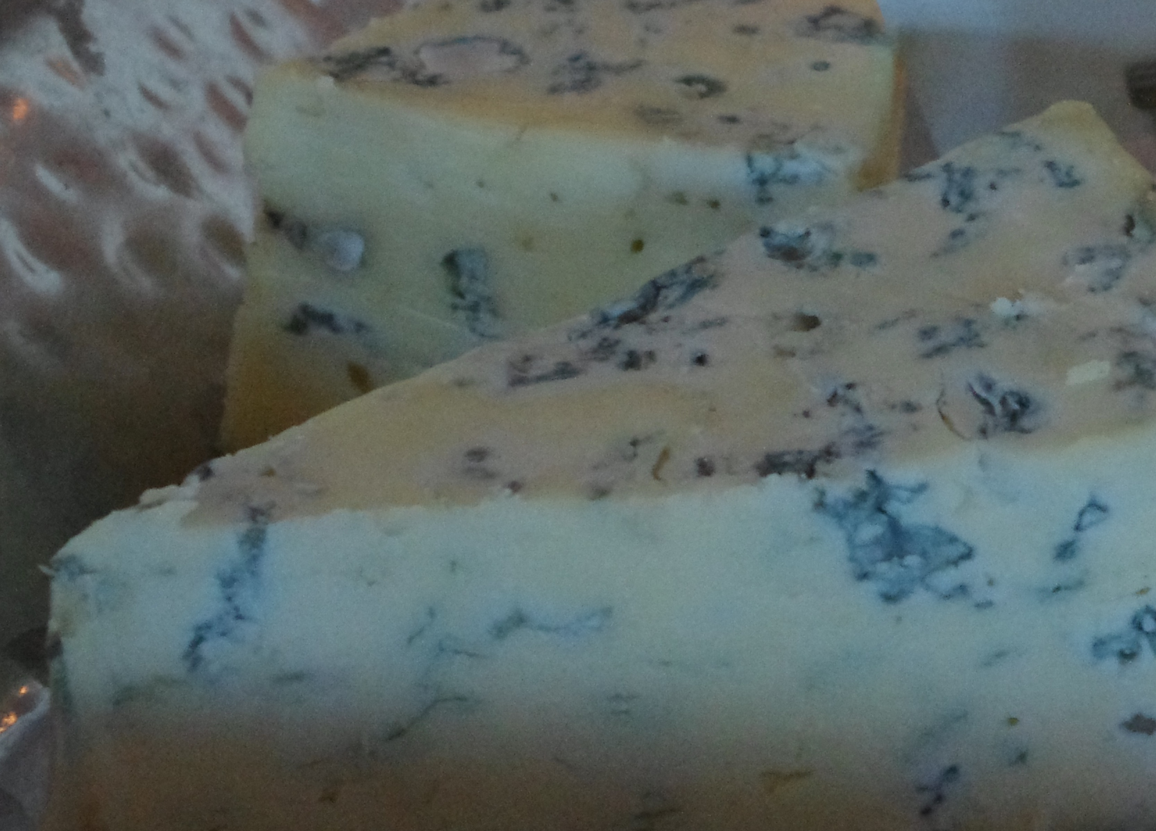 Rokforas siers